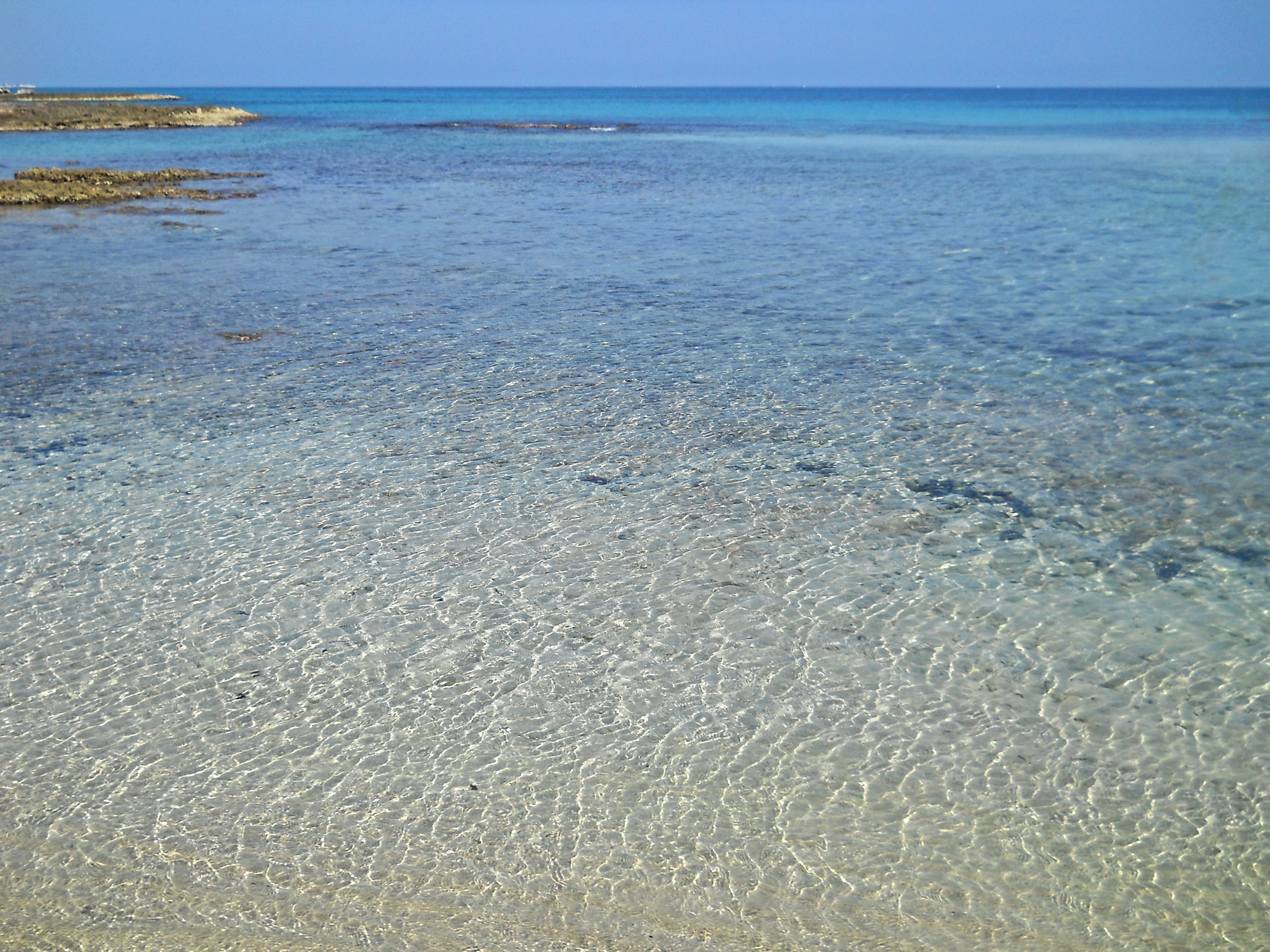 Riserva di Torre Guaceto This is a photo of a monument which is part of cultural heritage of Italy. The authorisation for taking photos of this object was provided by the World Wide Fund for Nature Italy.